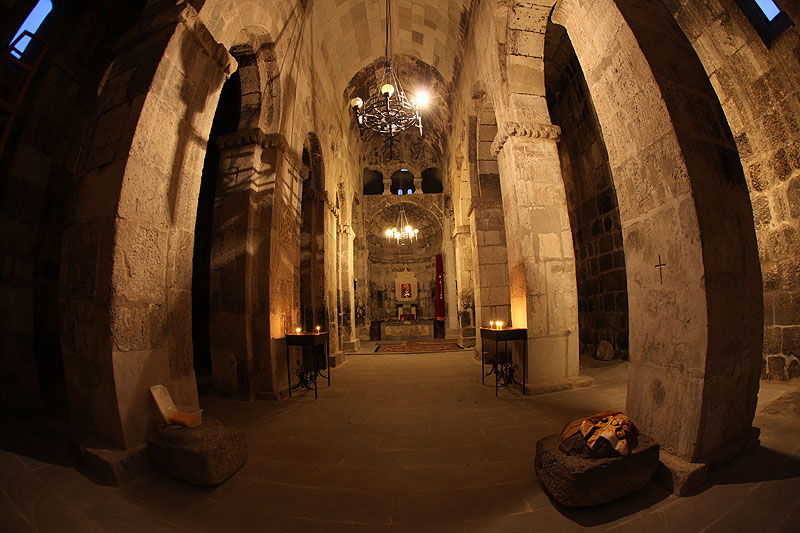 храм ЦицернакаванкAzərbaycanca: Ağoğlan monastırı